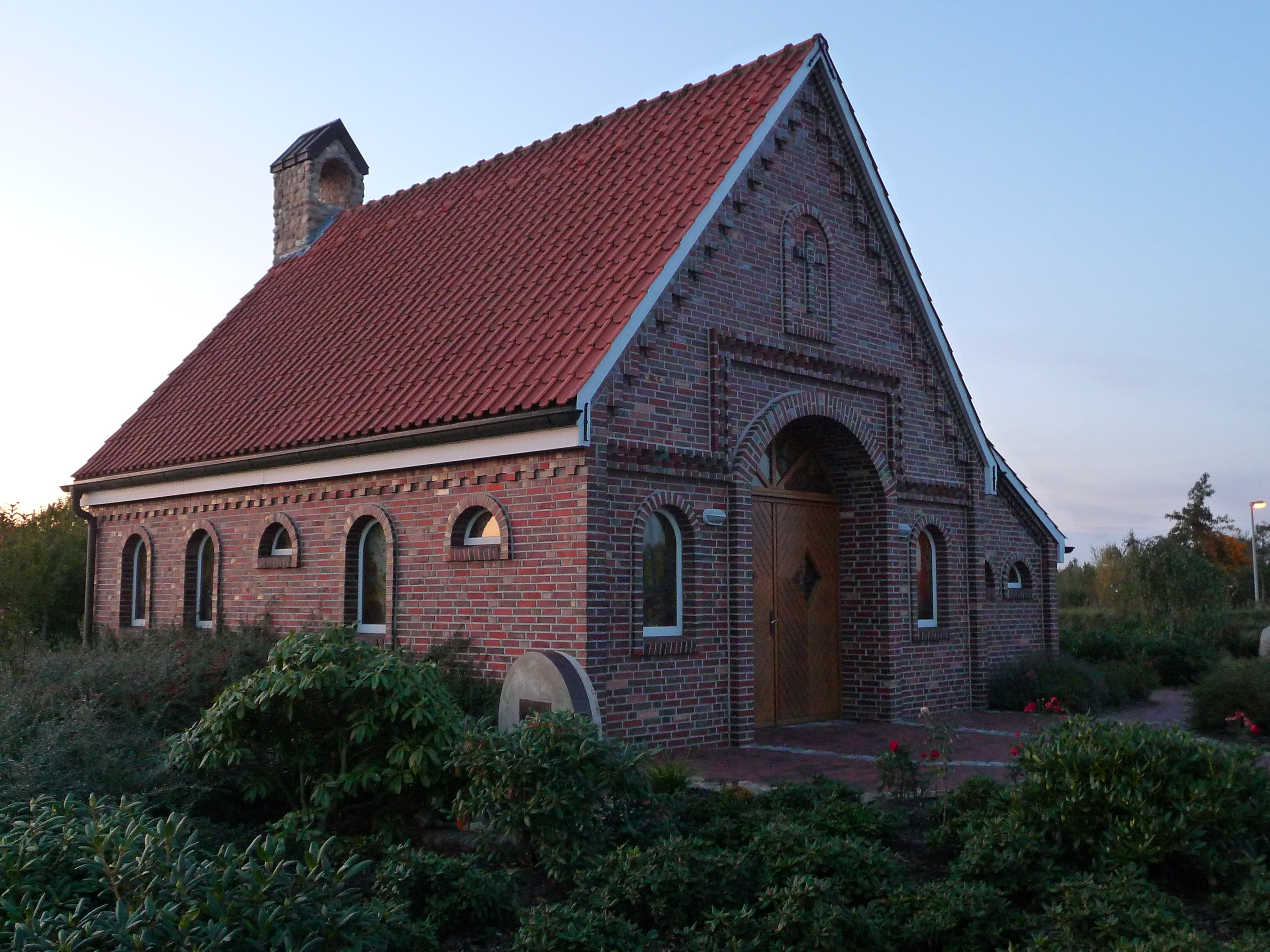 Stirnseite der ökumenischen Emsland-Autobahnkapelle "Jesus. Brot des Lebens" auf dem Rastplatz Heseper Moor an der A 31 (Niedersachsen, Deutschland), erbaut 2000